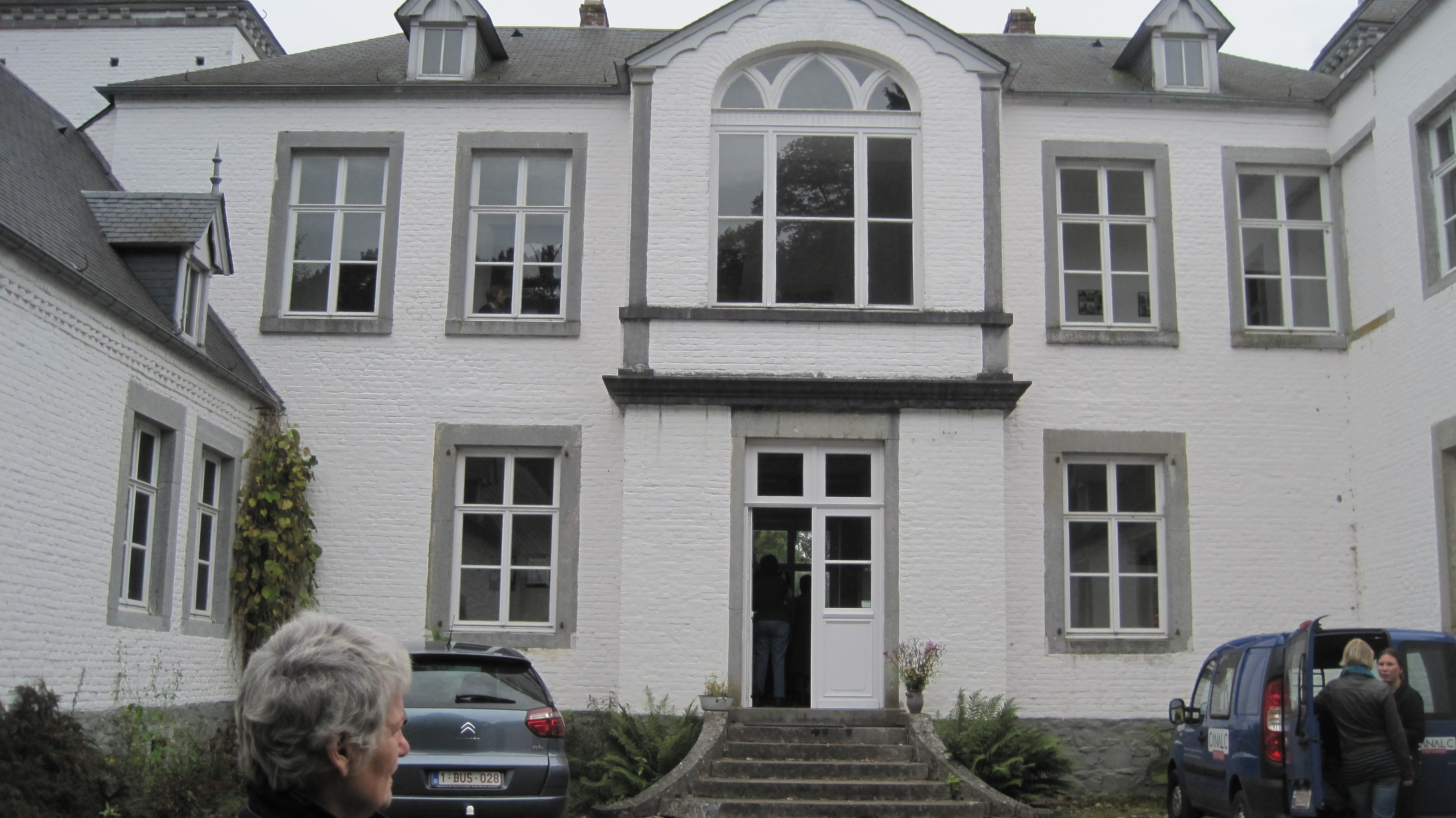 Façade de la ferme-château de Thozée ou vécut le peintre F. Rops